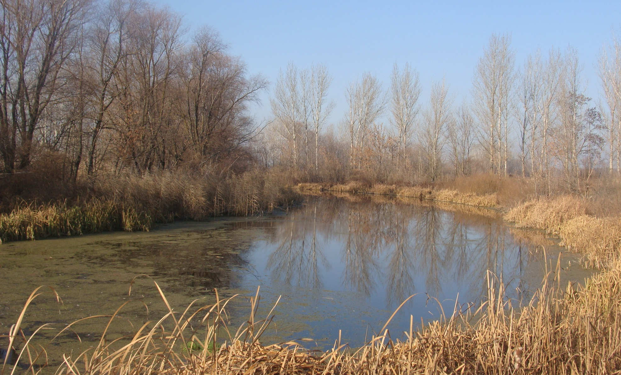 Балаклейка осенью